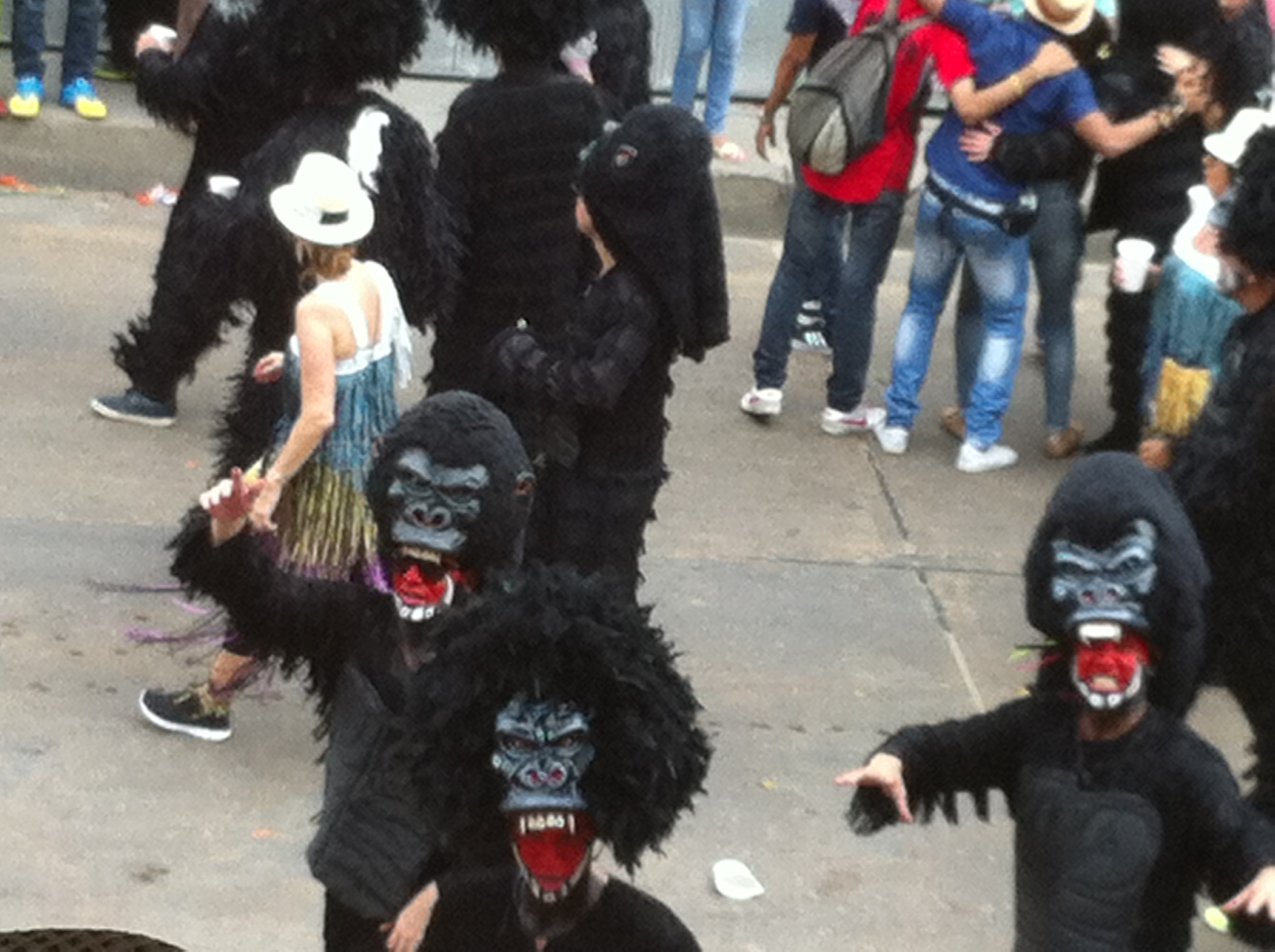 Gorilas - Carnaval de Barranquilla